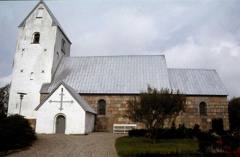 Vorde Kirke, Viborg Kommune, set fra syd